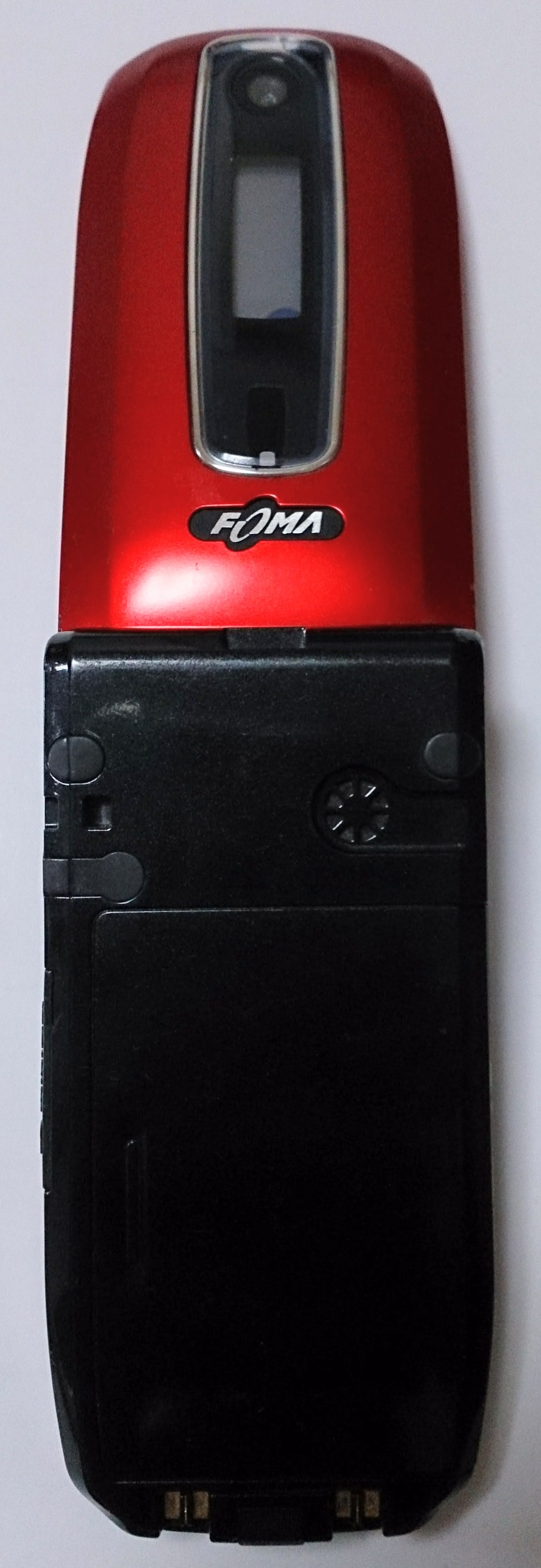 F2102V